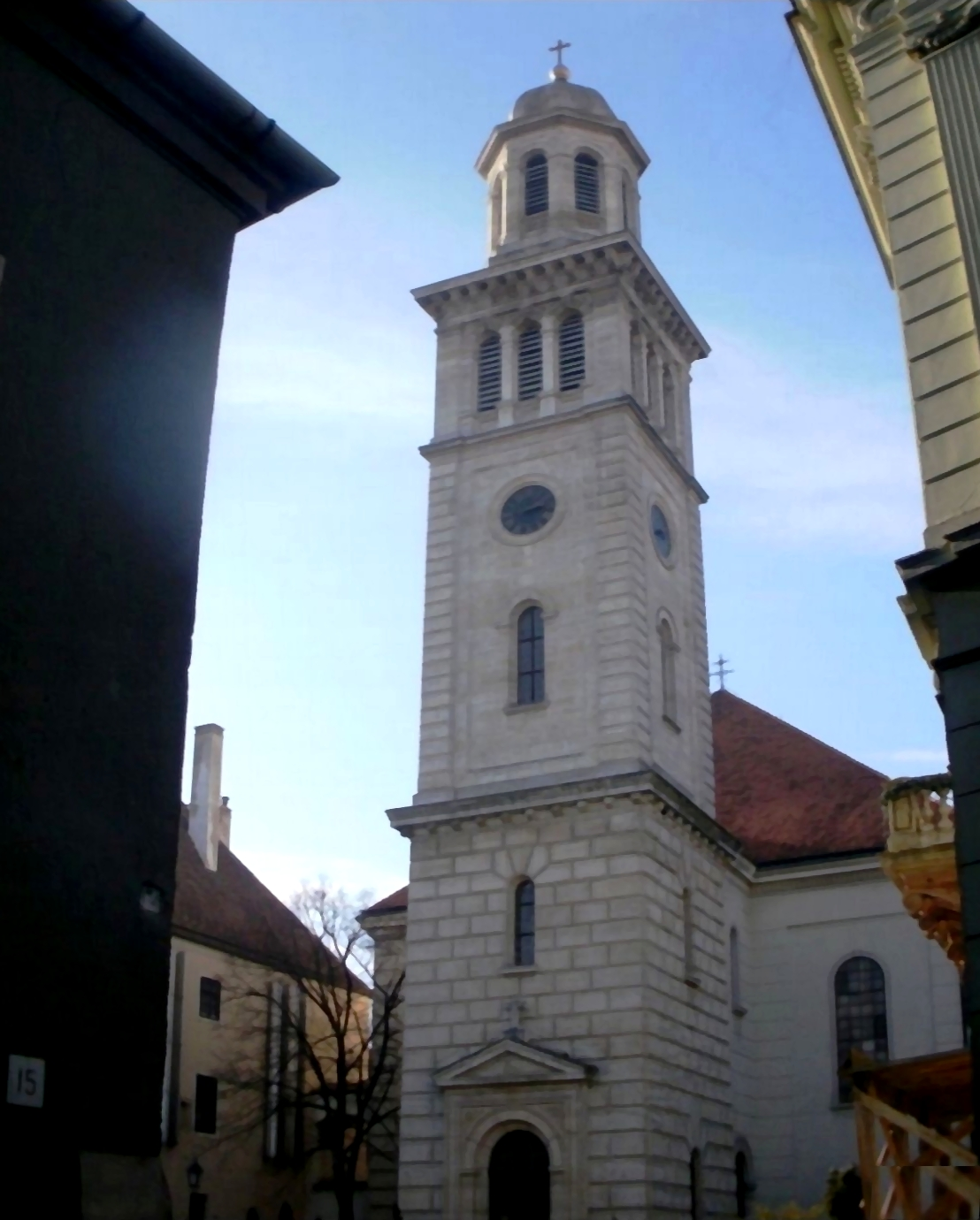 Ev. templom (Sopron, Templom u.)